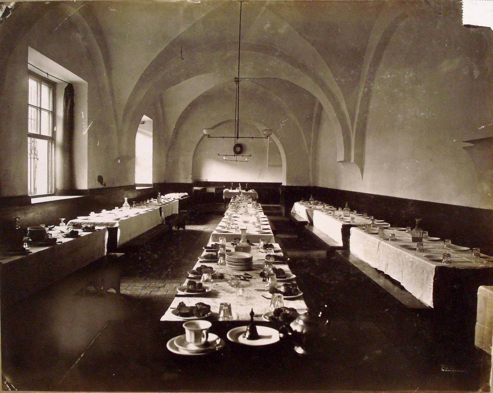 Antiguo edificio colonial del Colegio Nacional Buenos Aires, comedor para alumnos, fines del siglo XIX. Documento Fotográfico. Inventario 0861. Colección Witcomb